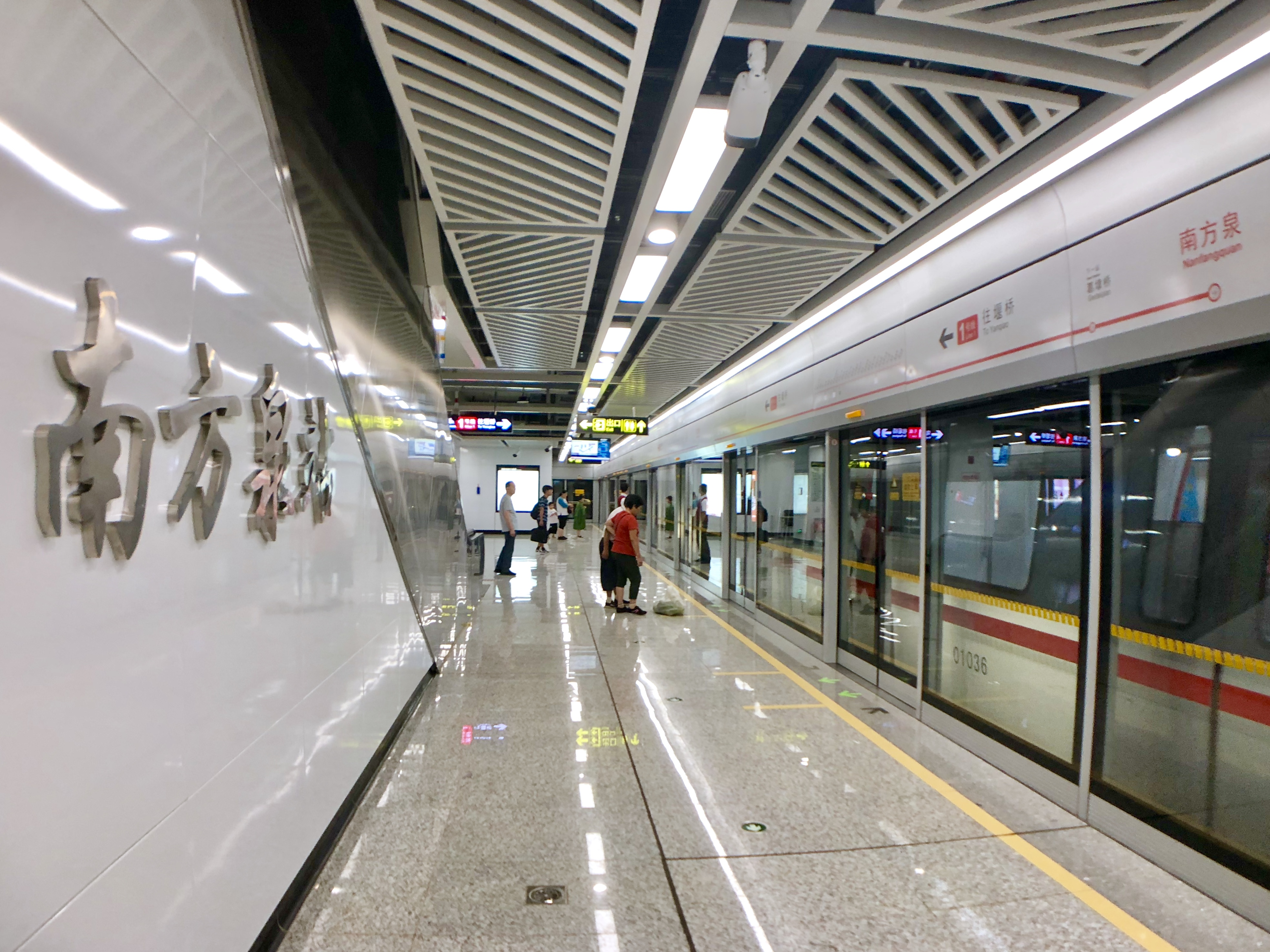 無錫地鐵1號線南方泉站站台